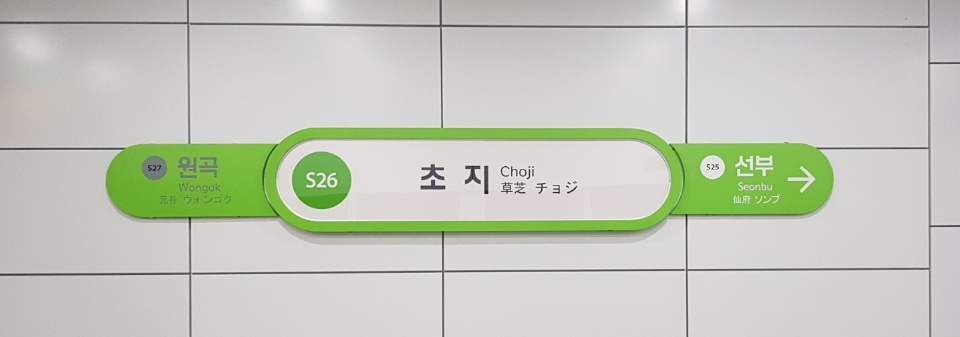 서해선 초지역 역명판